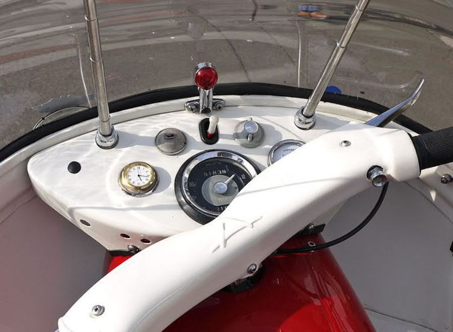 Panasonic G1 14-45 Lens